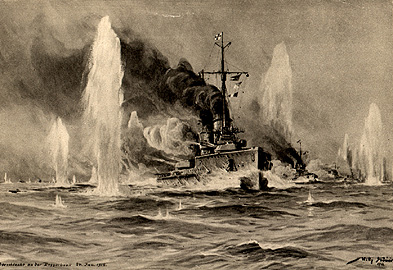 Deutsche Schlachtkreuzer im Gefecht an der Doggerbank am 24. Januar 1915